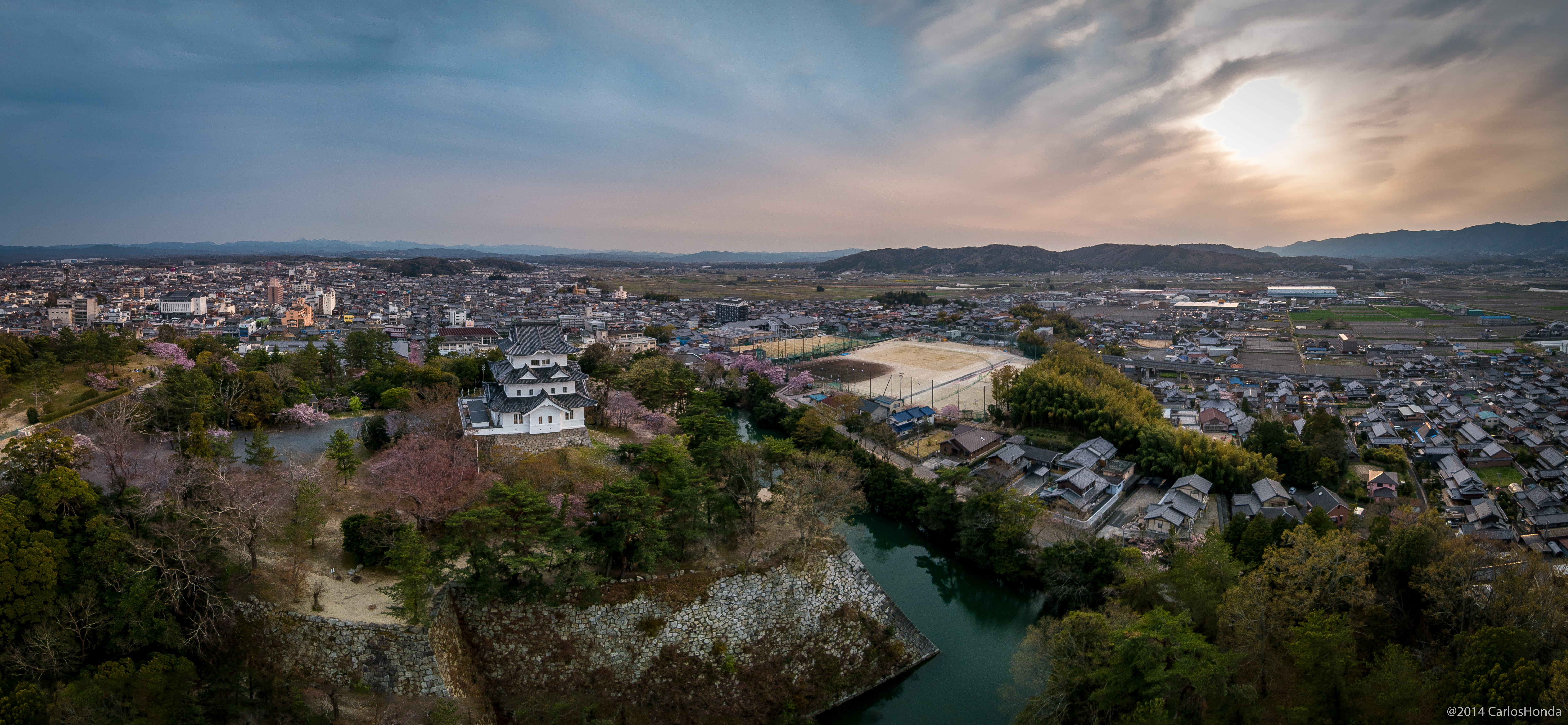 140412-1713 Ueno Park, Iga